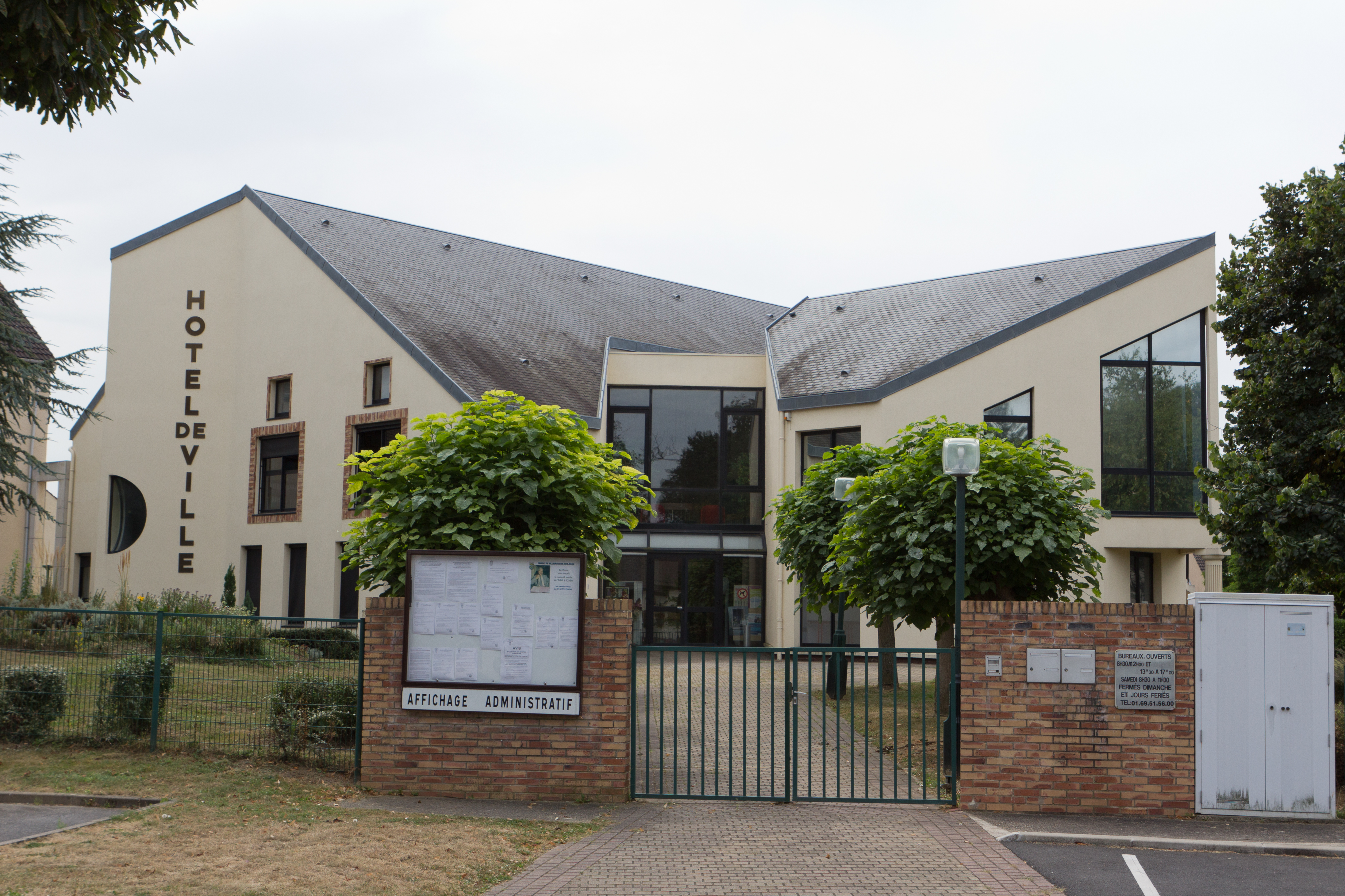 Mairie de Villemoisson-sur-Orge. Commune de Villemoisson-sur-Orge, département de l'Essonne. France